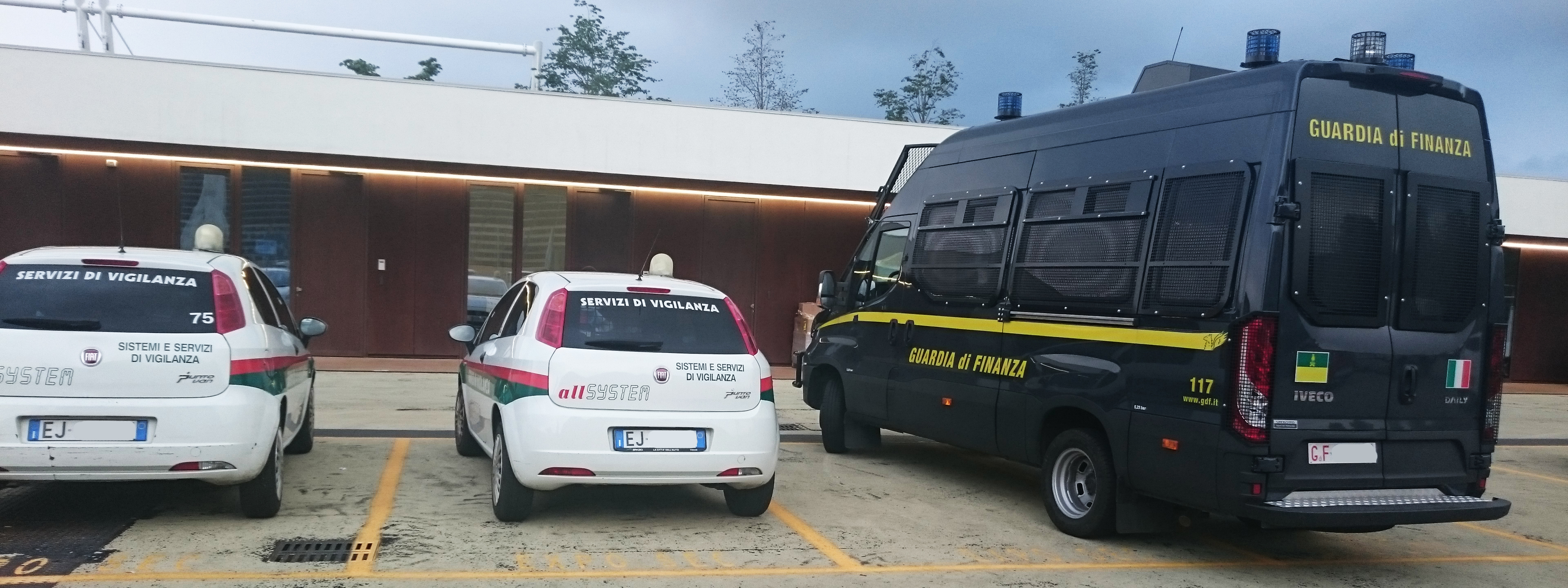 Fiat GP della Vigilanza CIVIS all'EXPO